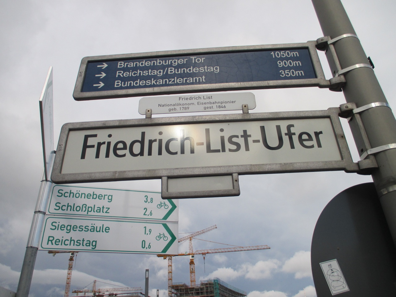 Berliner Straßenschild des Friedrich-List-Ufers in Berlin-Moabit mit Widmung